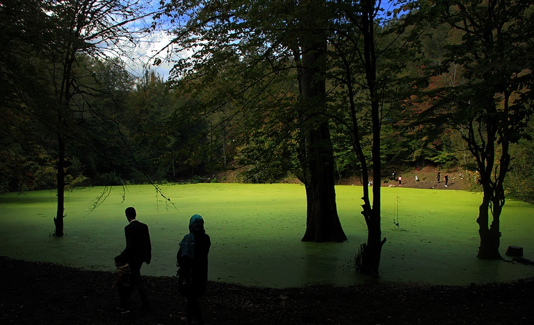 مرداب هَسَل